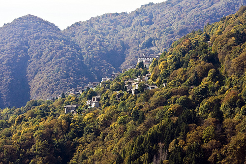 Intragna (VB): panorama